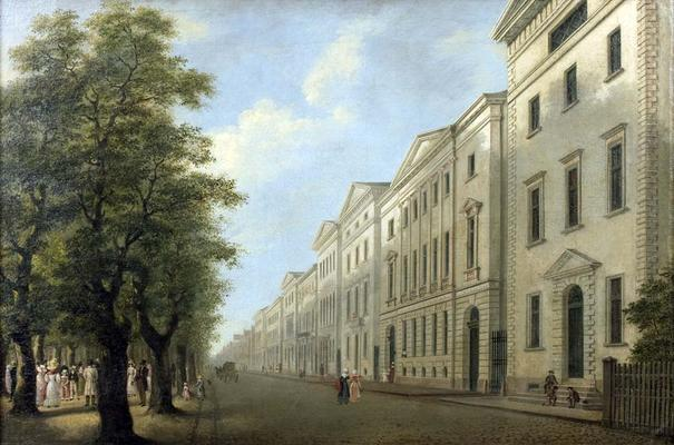 Südseite